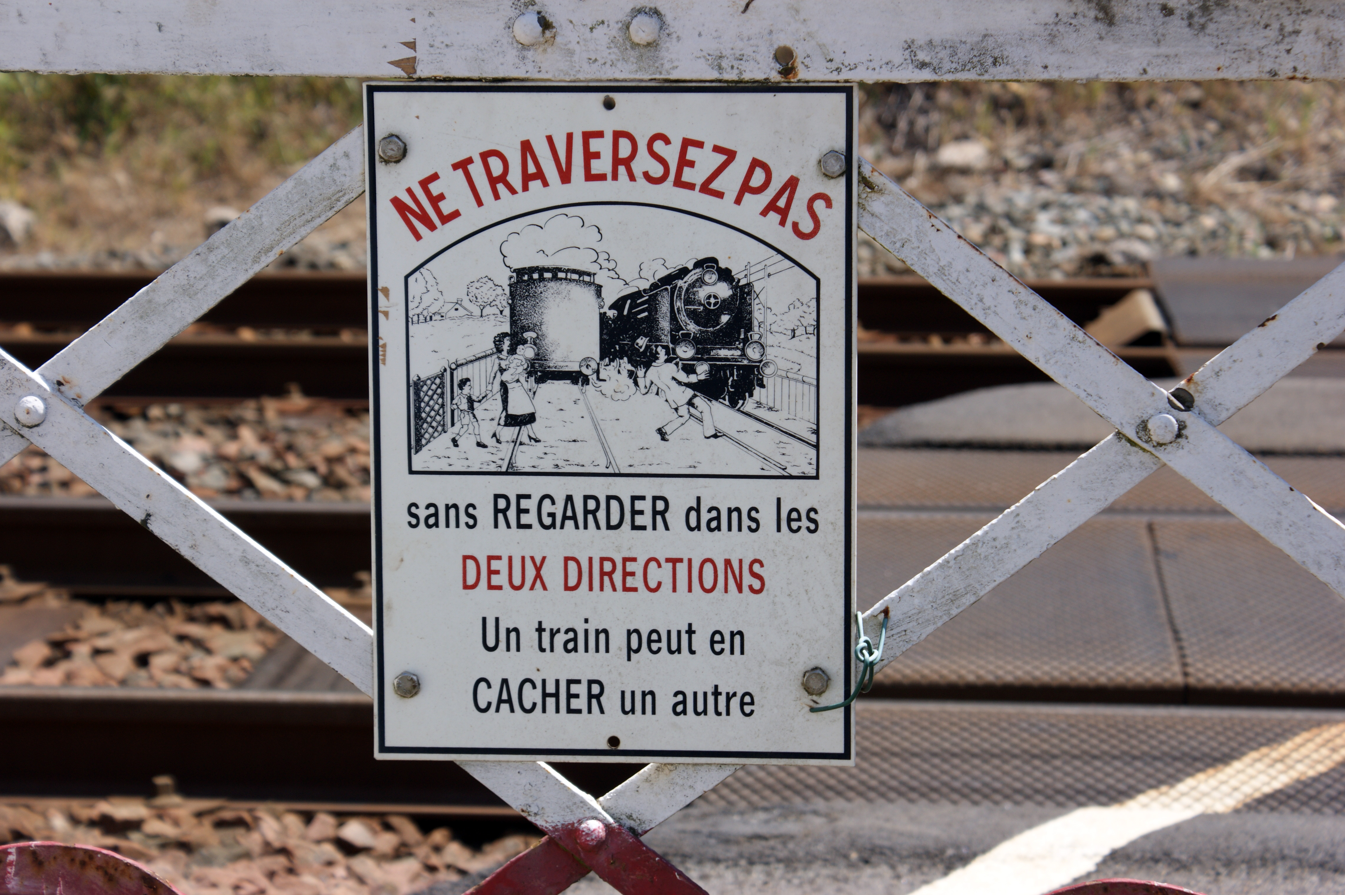 Détail du passage à niveau manuel n°378 à Pontchâteau, situé entre la gare et le tunnel. Le portillon et l'ancienne plaque émaillé évoquant les risques.